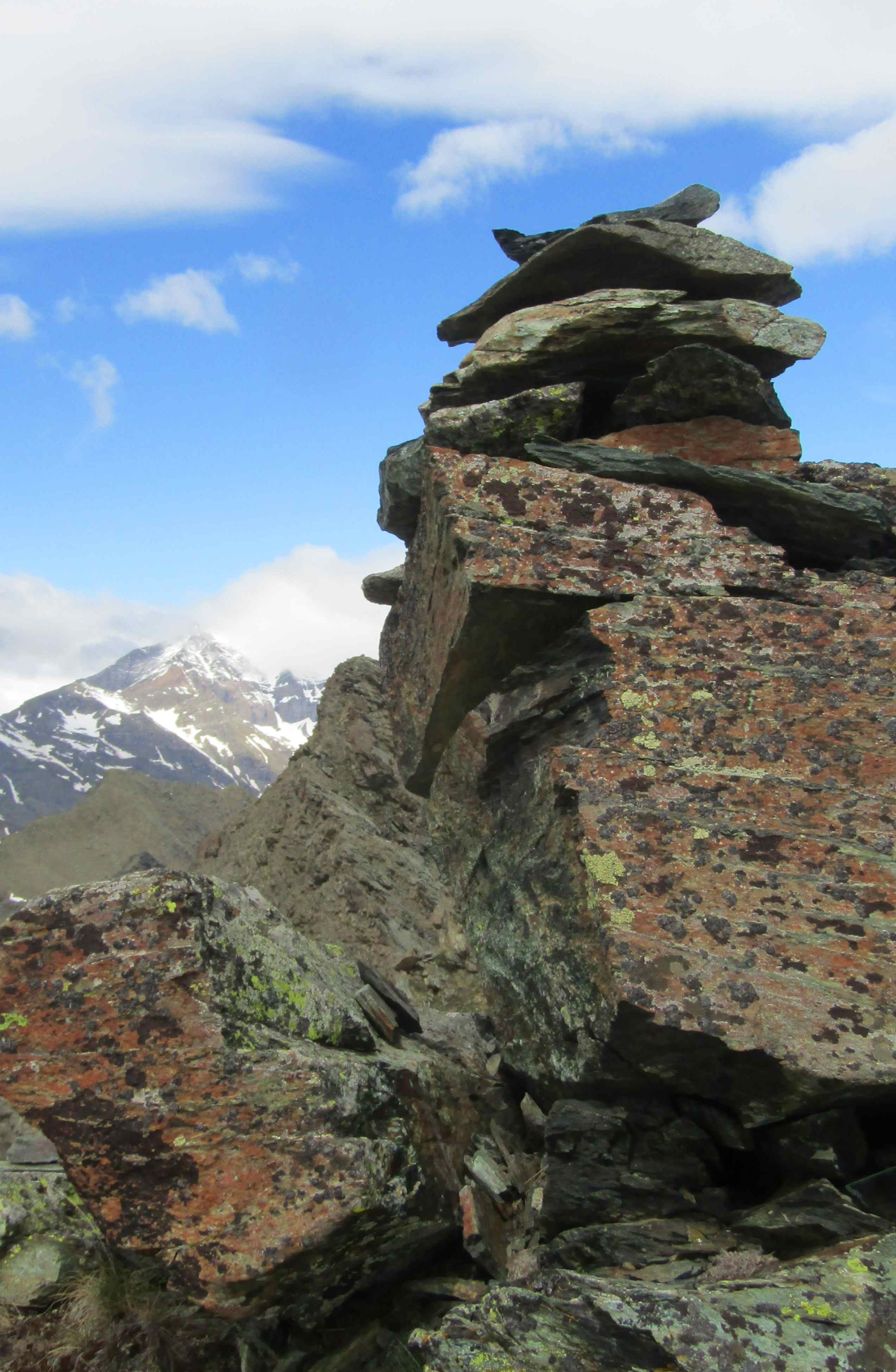 Ometto di pietrame sulla cima della Punta Cruvin (Alpi Graie), sullo sfondo il Rocciamelone